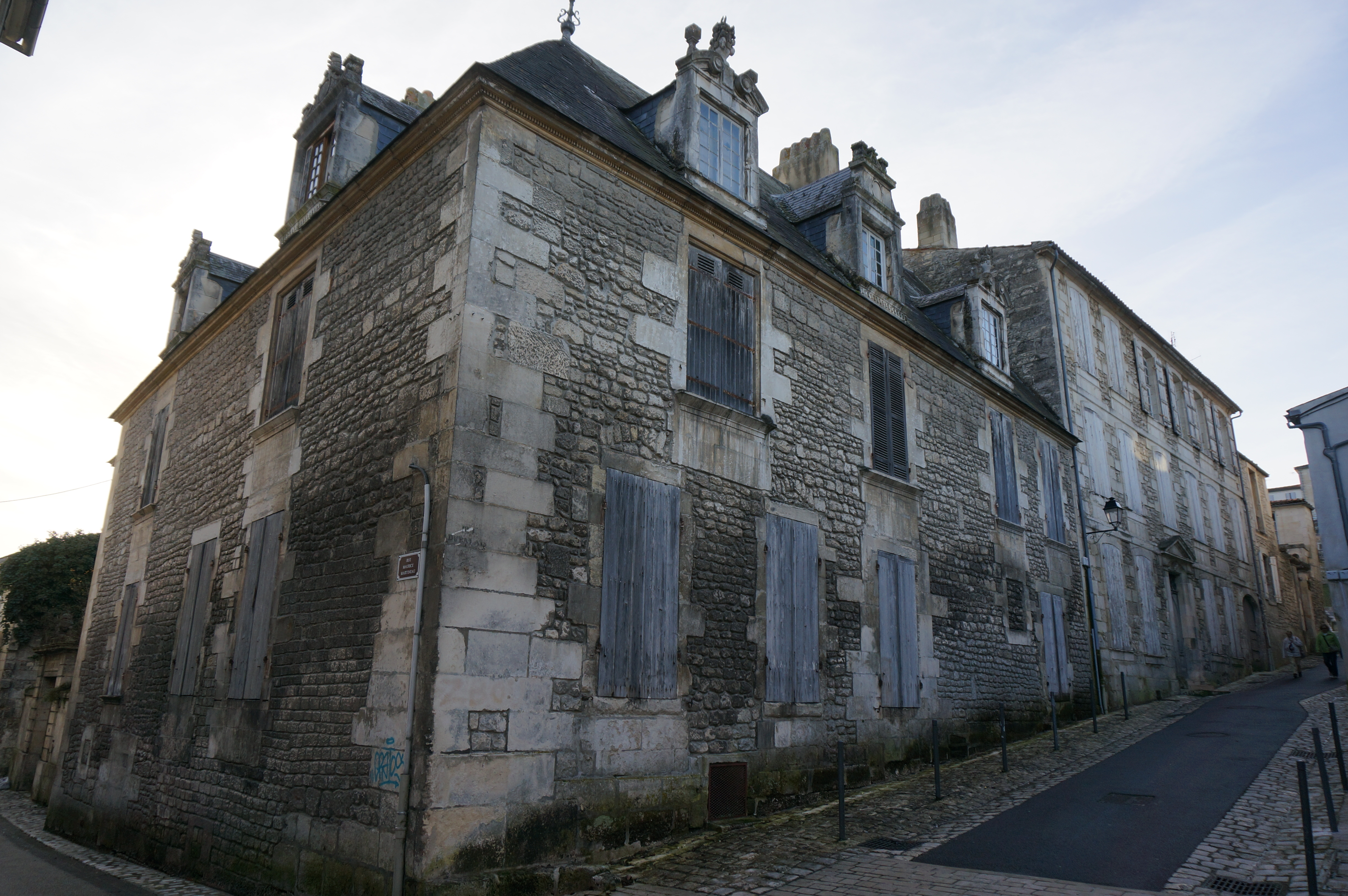 Saintes.